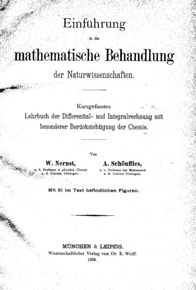 Nernst-Schönflies, Originalausgabe 1895